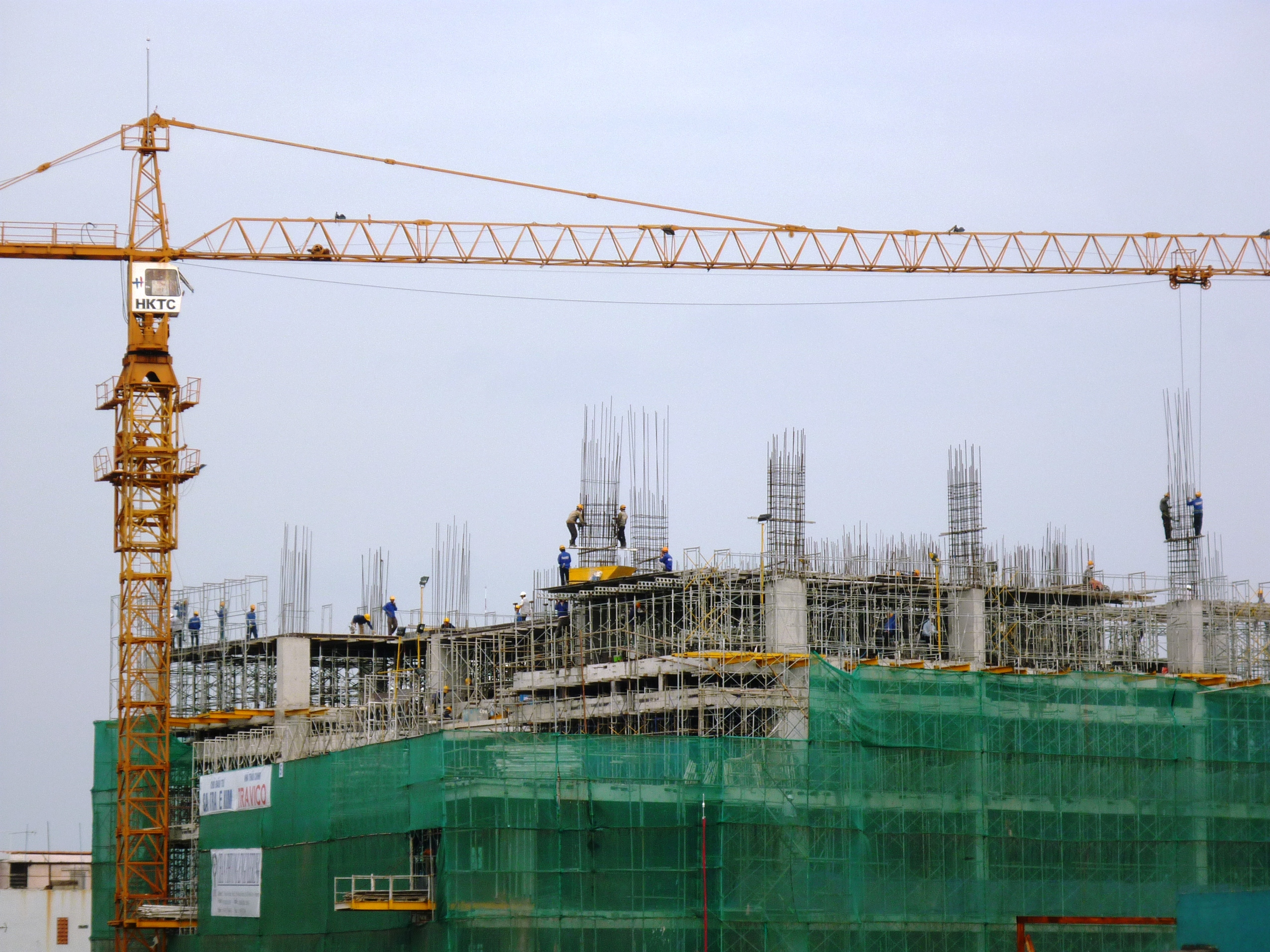 Thợ hồ đang vào sắt cột để đổ cột trên công trình tòa nhà Satra Đất Thành